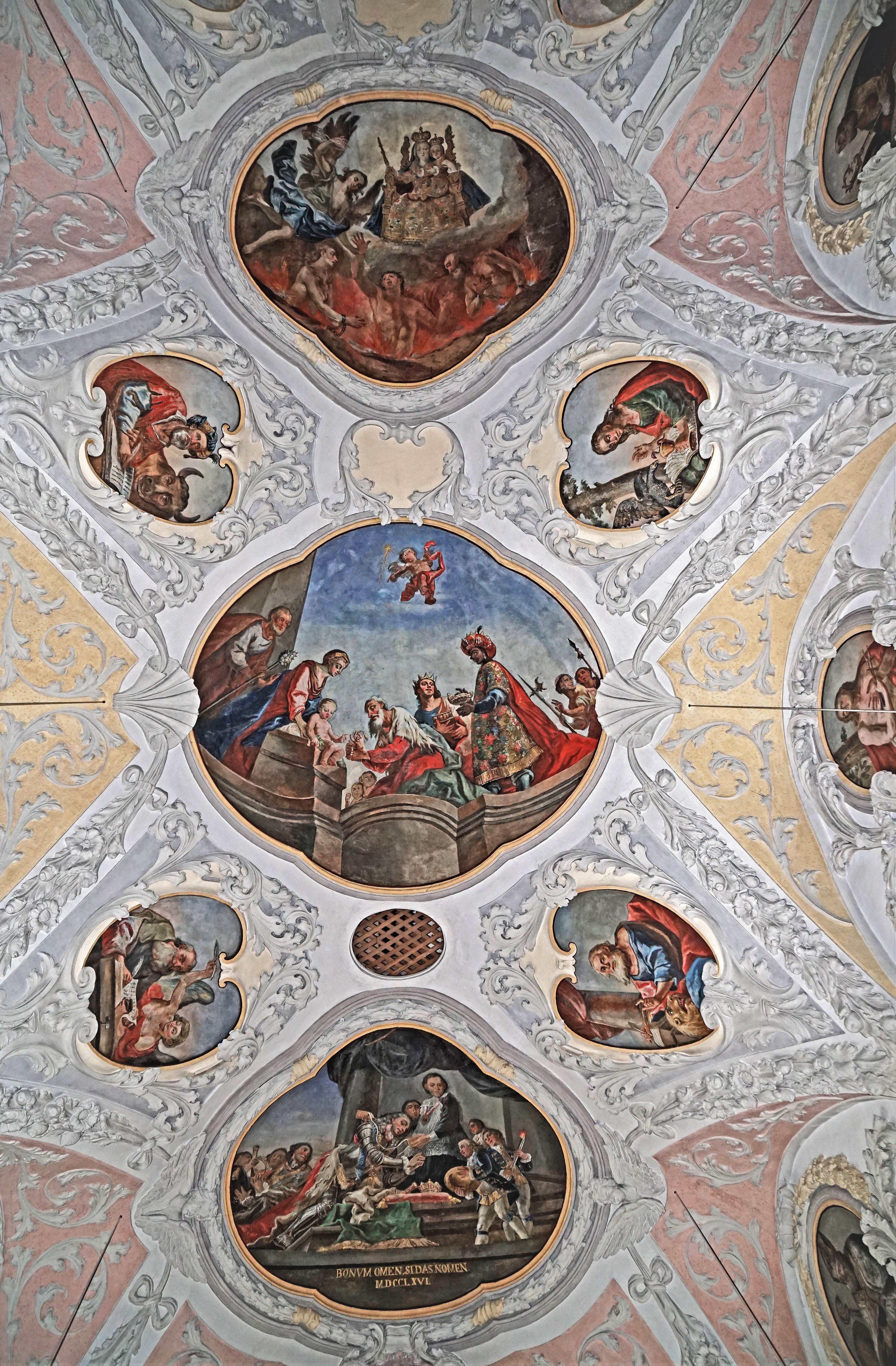 Röm.-kath. Pfarrkirche Mariä Himmelfahrt (Grassau), Deckenfresken im Langhaus